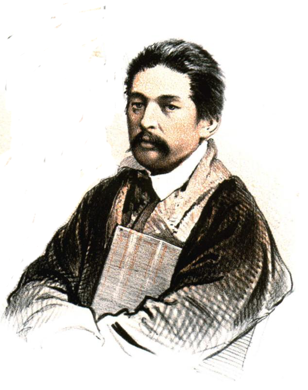 Казахский этнограф Мухаммед-Салих Бабаджанов (1834-1871). Рисунок сделан в 1861 году с фотографии делегации представителей киргиз-кайсацких орд в С.-Петербург в связи со сменой ведомства подчинения (Министерства госимуществ на Министерство внутренних дел). Рисунок был опубликован в "Русском художественном листке" №21 от 20 июля 1861 года